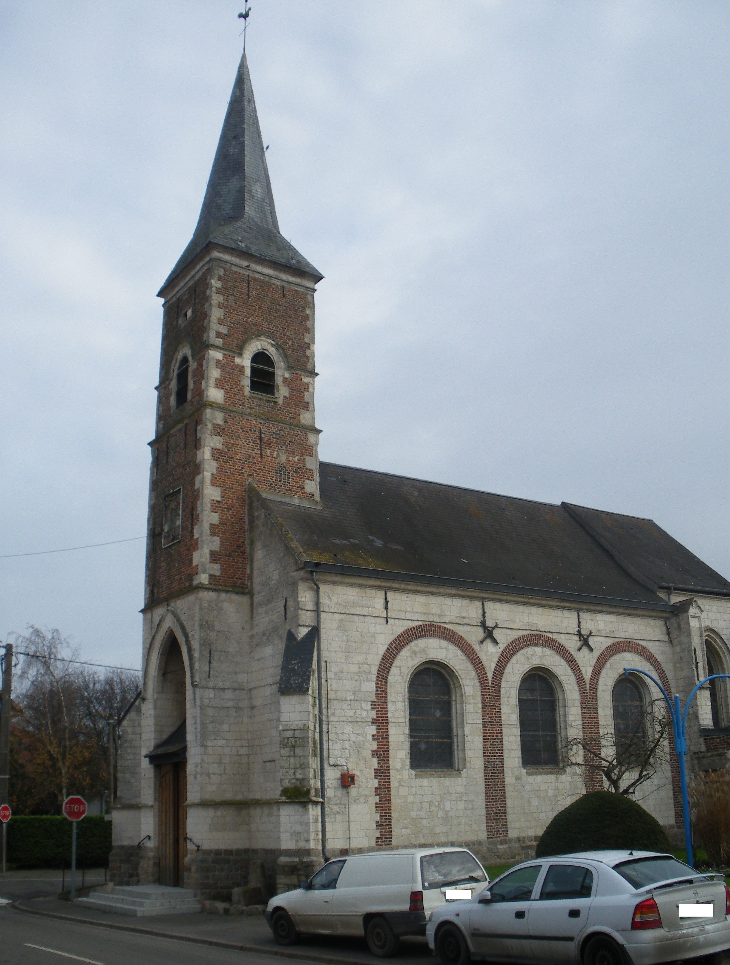 Vue de l'église de Verquigneul.